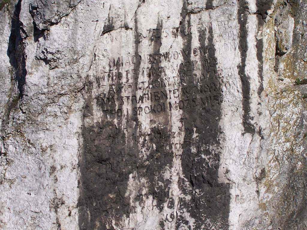 Nature reserve Skała Kmity